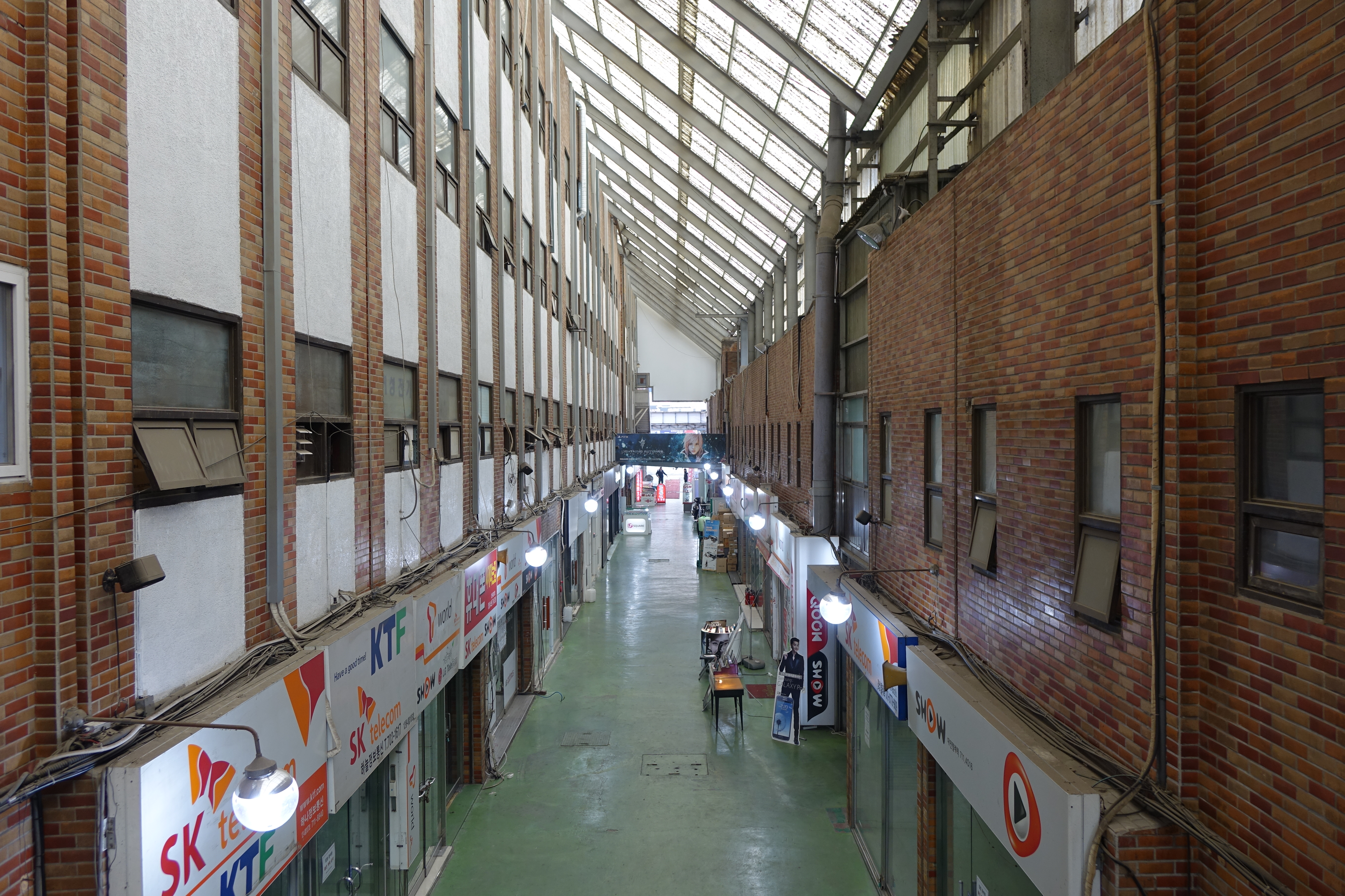 2015년 1월 27일 최광모 촬영